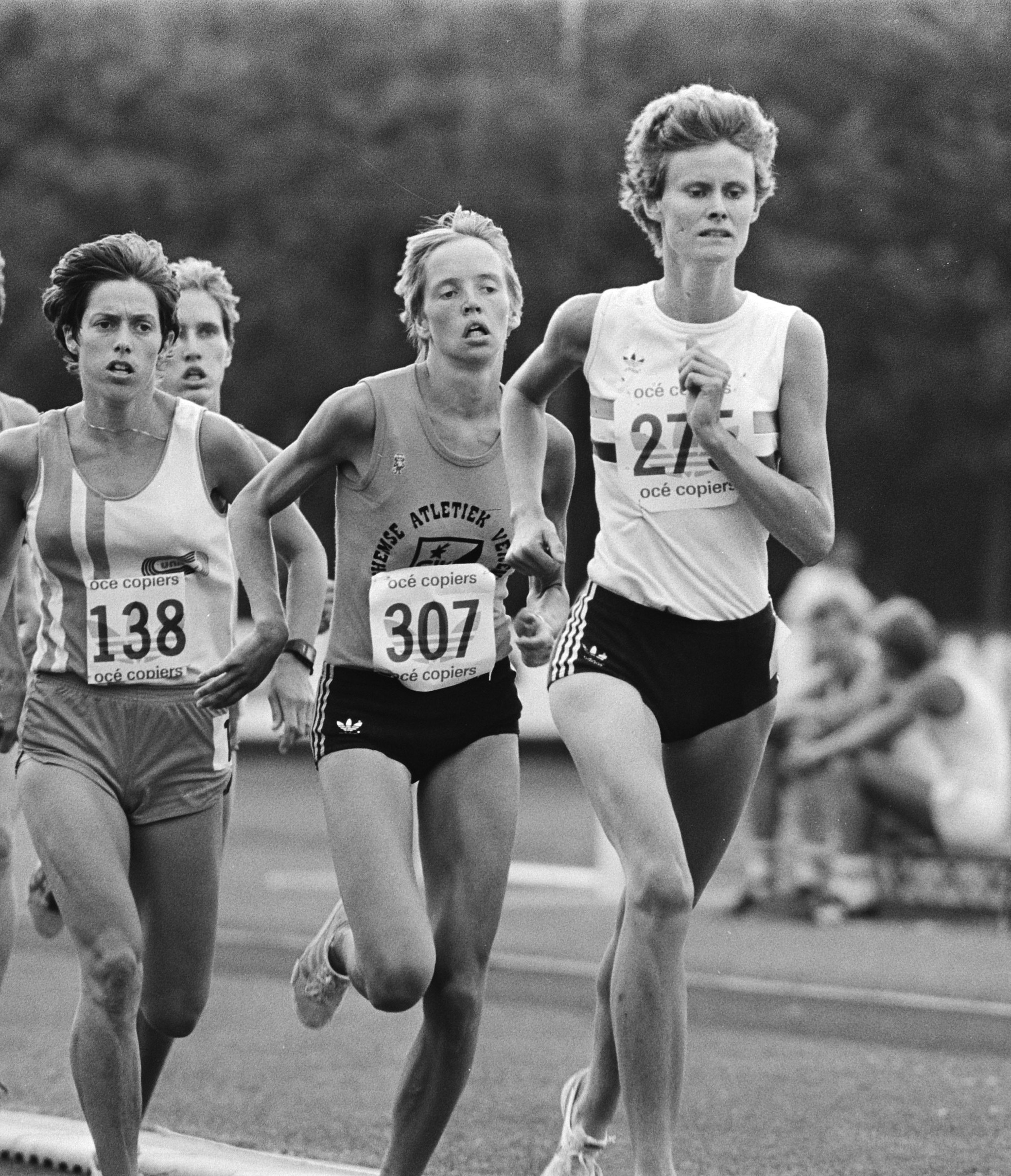 Nederlandse Atletiekkampioenschappen te Vught: Elly van Hulst (r) gaat de 1500m winnen.